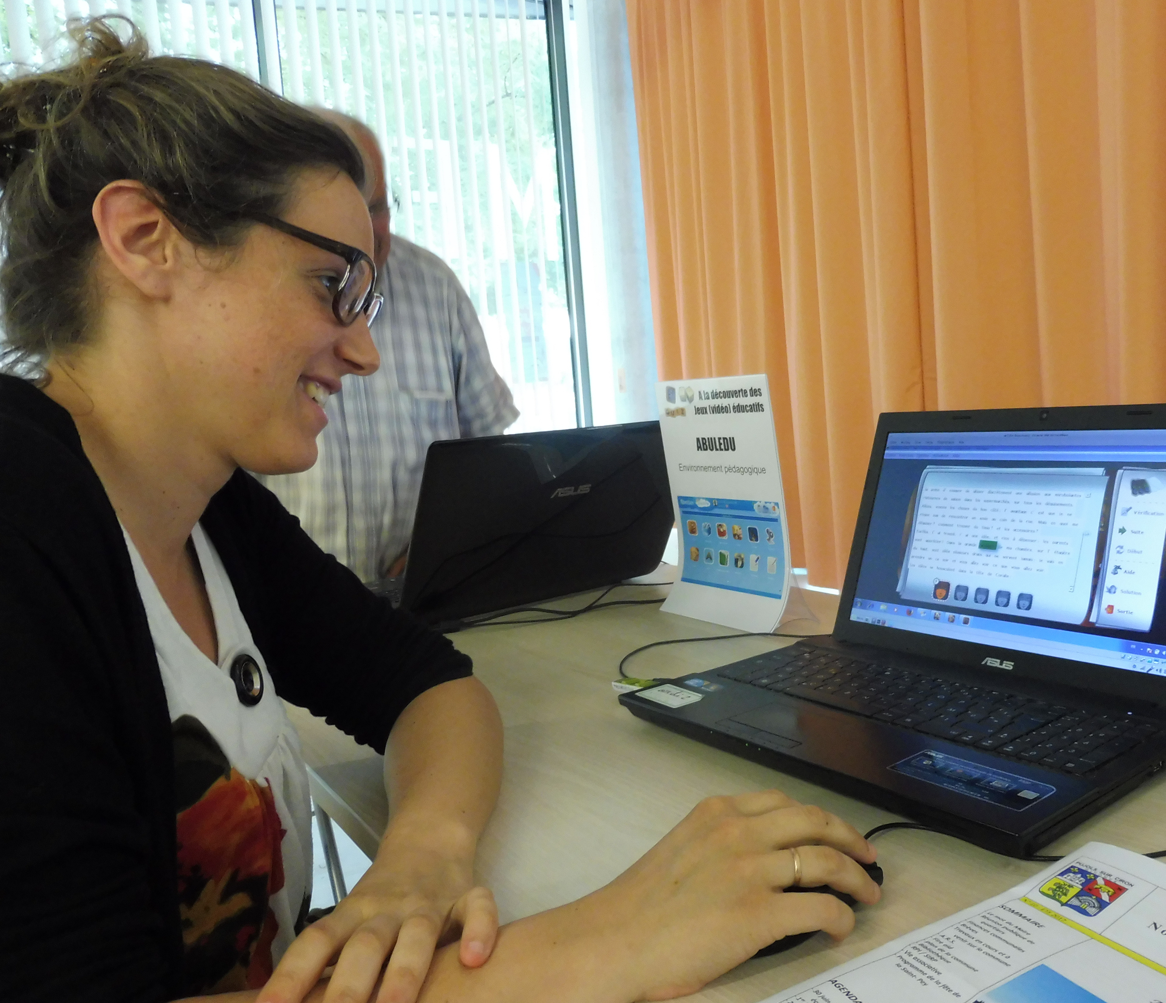 La suite logicielle AbulÉdu à Podensac-33 le samedi 1er juillet 2017 ː test du logiciel ALLER, recherche rapide.